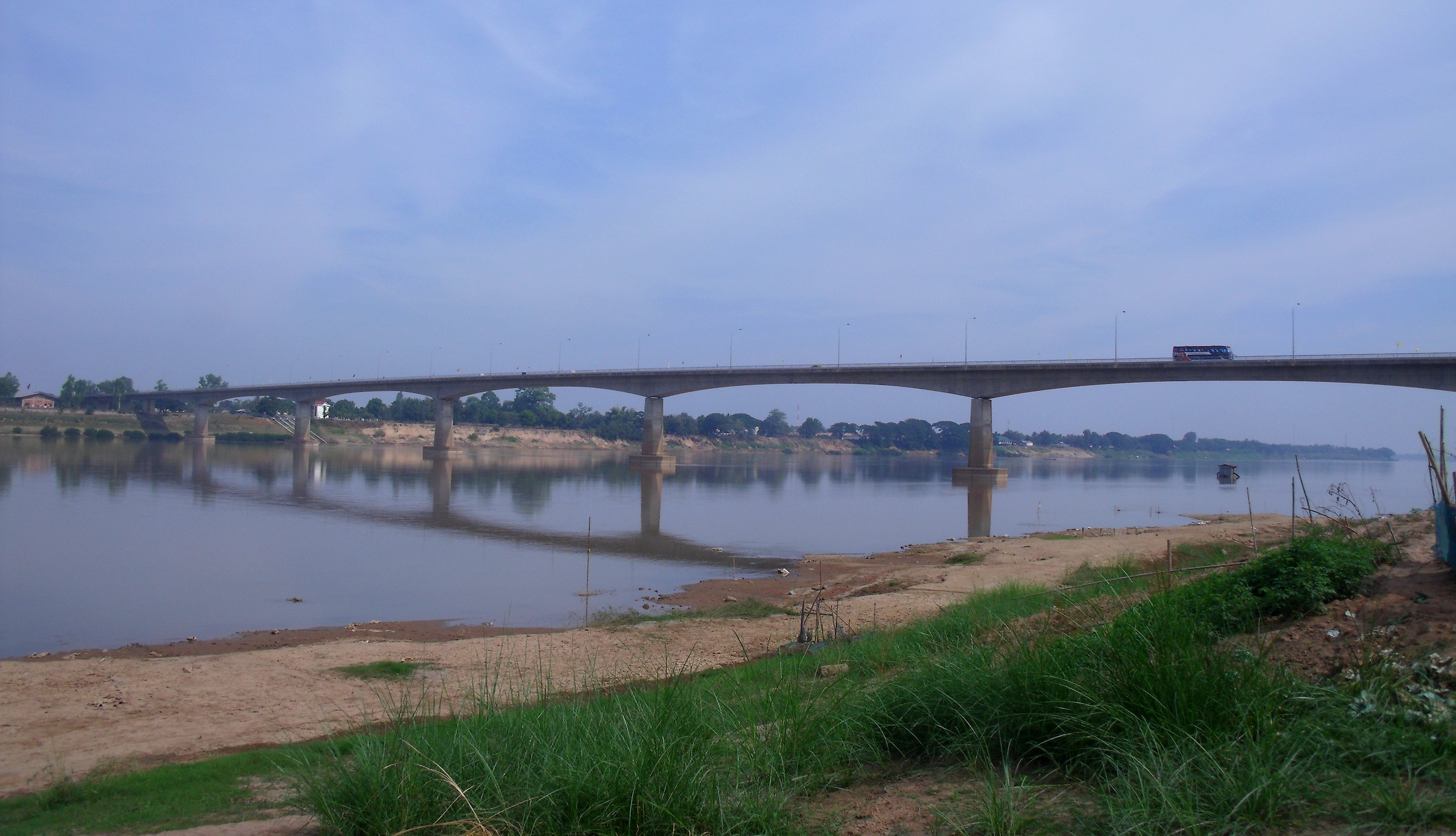 Le Pont de l'Amitié entre la Thaïlande et le Laos, vu du coté Thaï.